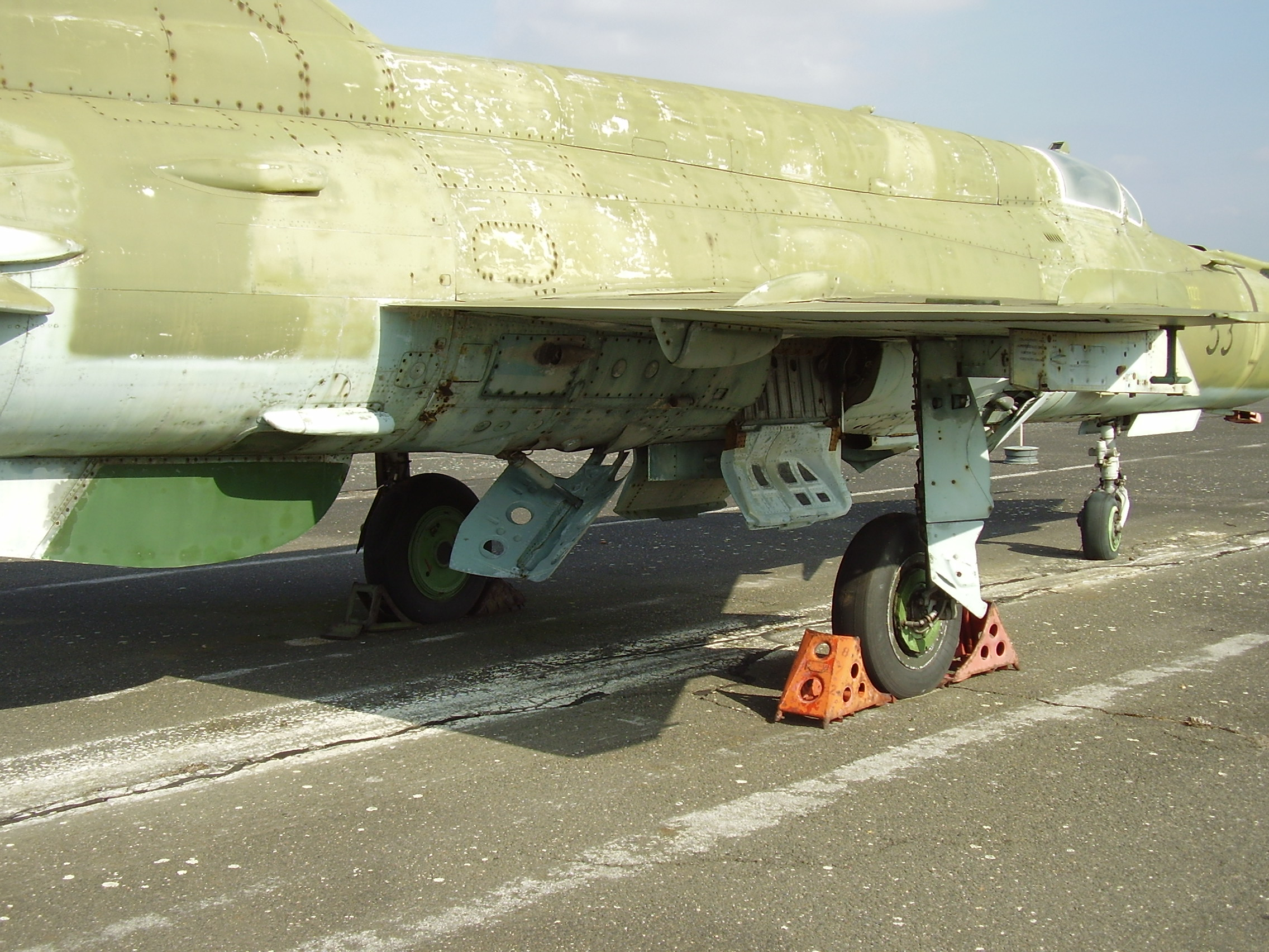 Luftwaffenmuseum der Bundeswehr; Airforce Museum of the Bundeswehr; Berlin-Gatow